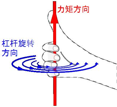 右手定則应用在力矩